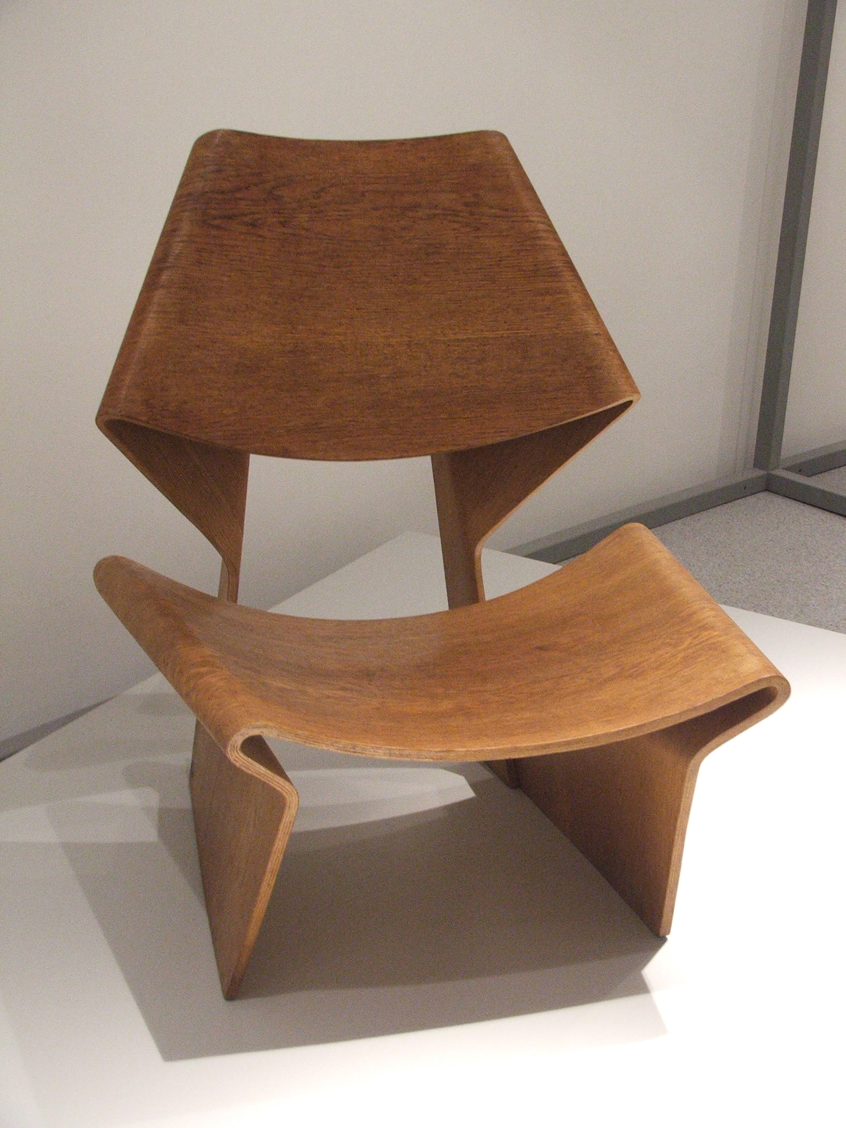 Grete Jalk's GJ chair exhibited in Pinakothek der Moderne in Munich